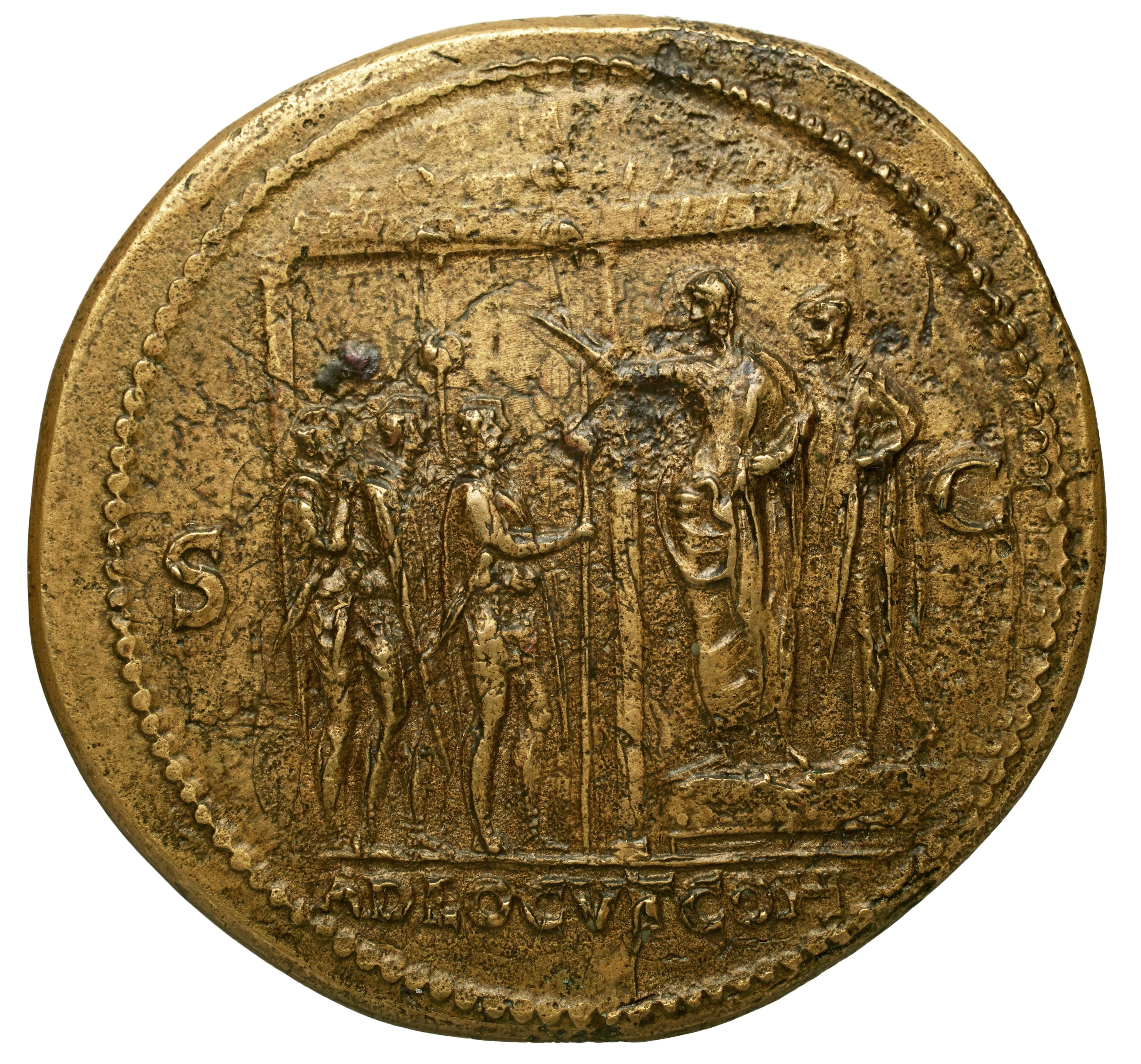 Sesterce de Néron. Revers : ADLOCVT COH (à l'exergue). Dans le champ, S C. Néron vêtu de la toge, debout à gauche sur une estrade et accompagné d'un officier (decurio Germanorum), haranguant trois soldats armés chacun d'un gladius (deux d'entre eux, les plus proches de l'estrade, sont barbus et tiennent des enseignes) ; en arrière de la scène, un bâtiment dont on voit trois colonnes. Orichalque (laiton) , 26,83 gr. Lyon, 65 ap.JC. Collection BnF : IMP-6435